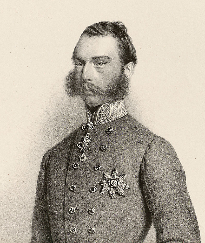 Sigmund Erzherzog von Österreich (1826-1891)